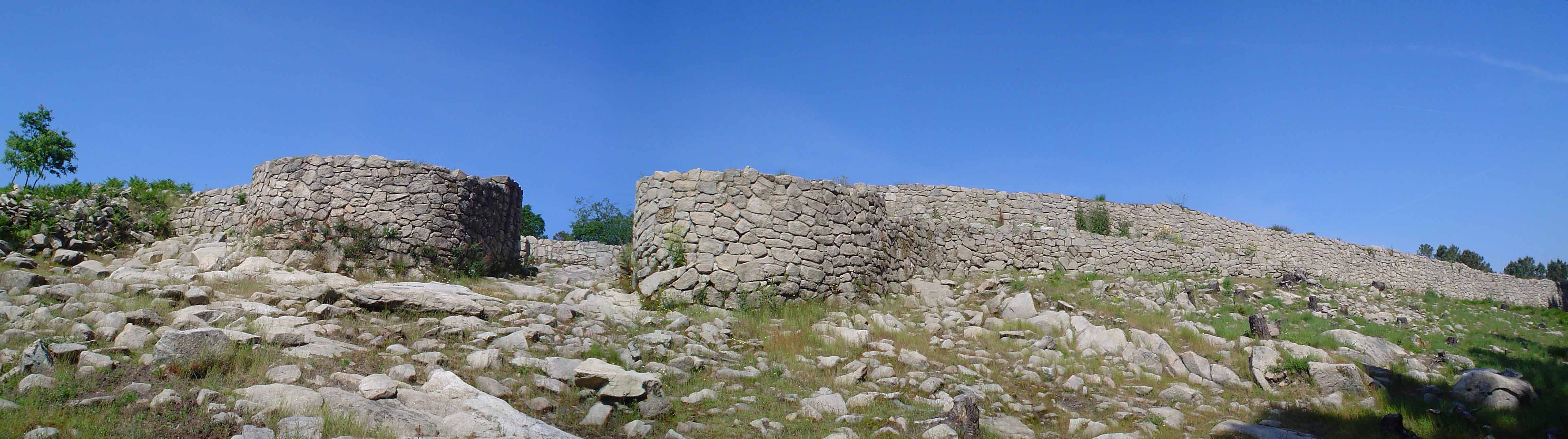 Muralla e porta principal do Castro de San Cibrao de Las